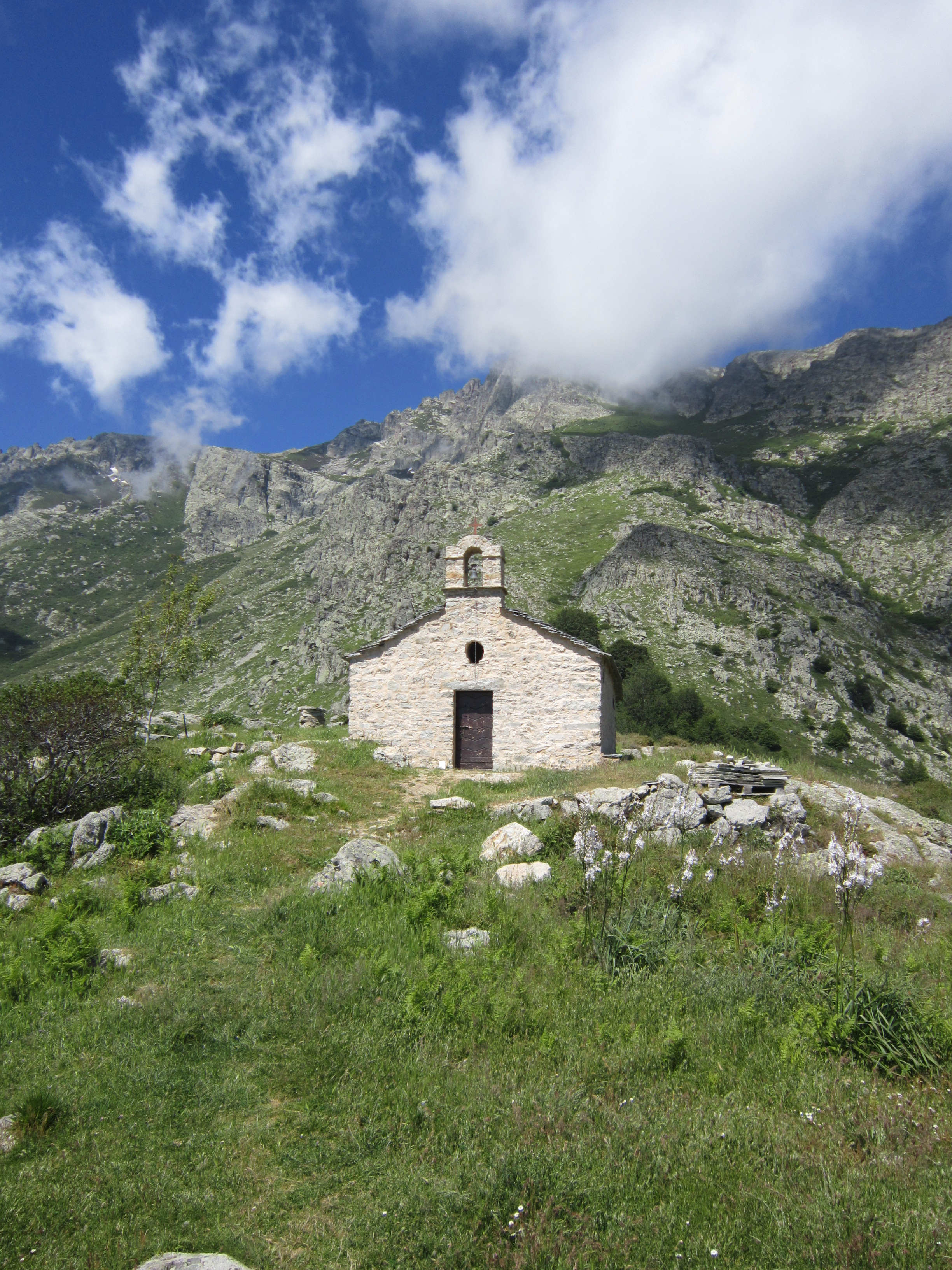 Chapelle San Eliseu (Monti Cardu) (1555 m)